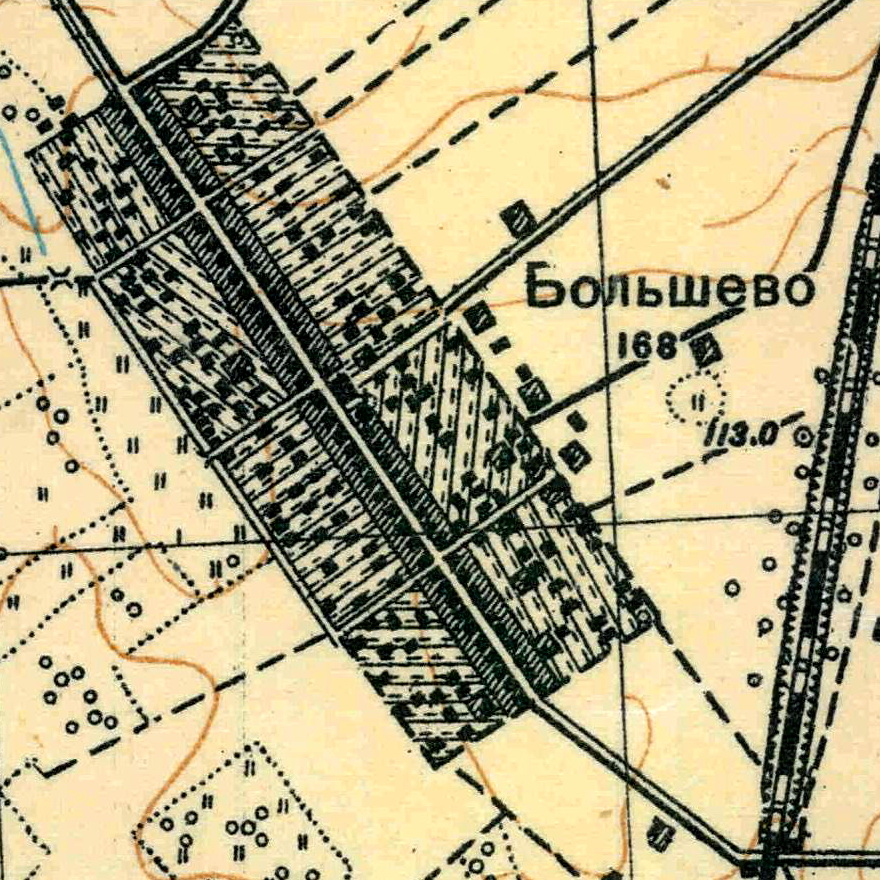 Топографическая карта Ленинградской области, квадрат О-36-25-А-а (Лампово), деревня Большево